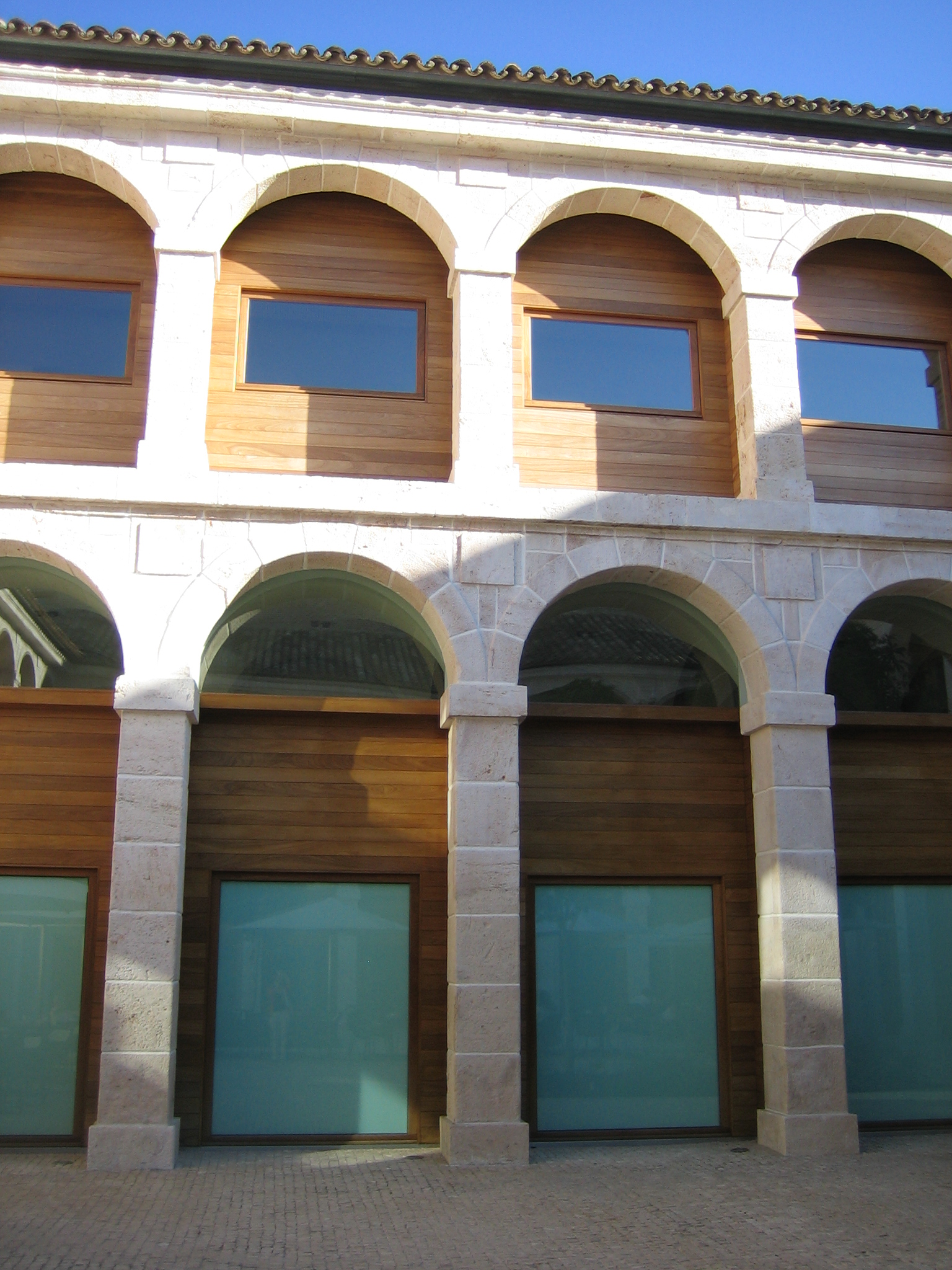 Alzado del patio del Convento de Santo Tomás (Parador de Alcalá de Henares)